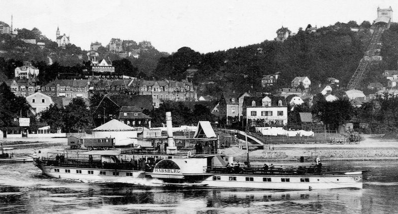 Raddampfer Habsburg in Loschwitz